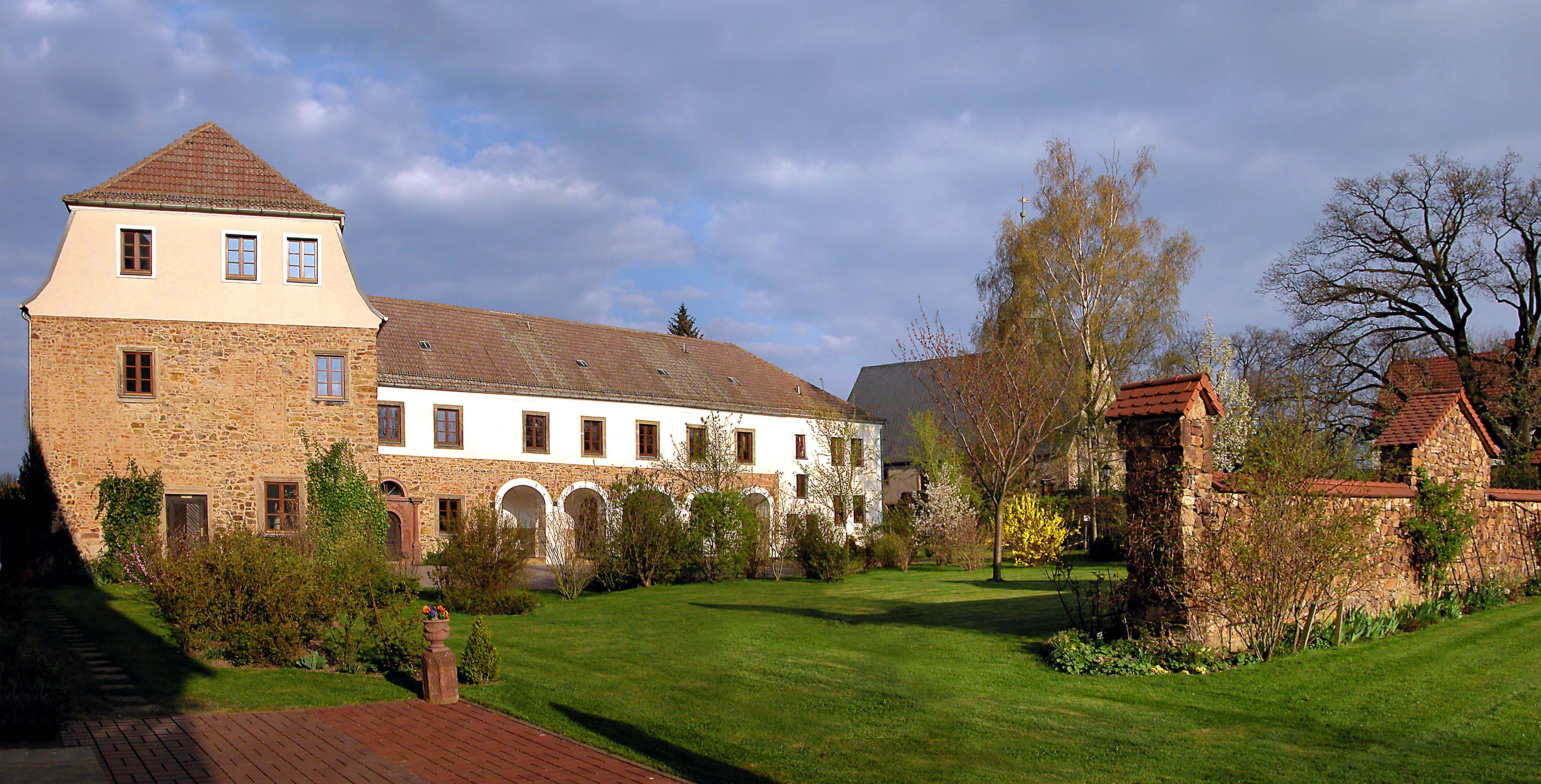 22.04.2005 04720 Mockritz (Gemeinde Großweitzschen): Schloß, im Wesentlichen 16. und 17. Jh. 1945 zerstört, 1959 wieder aufgebaut. Ab 1993 von Familie Eberhard von Kuenheim saniert und ausgebaut. Sicht von Westen zum Ostflügel und der Kirche. [DSCN6539-6540.TIF]20050422202MDR.JPG(c)Blobelt